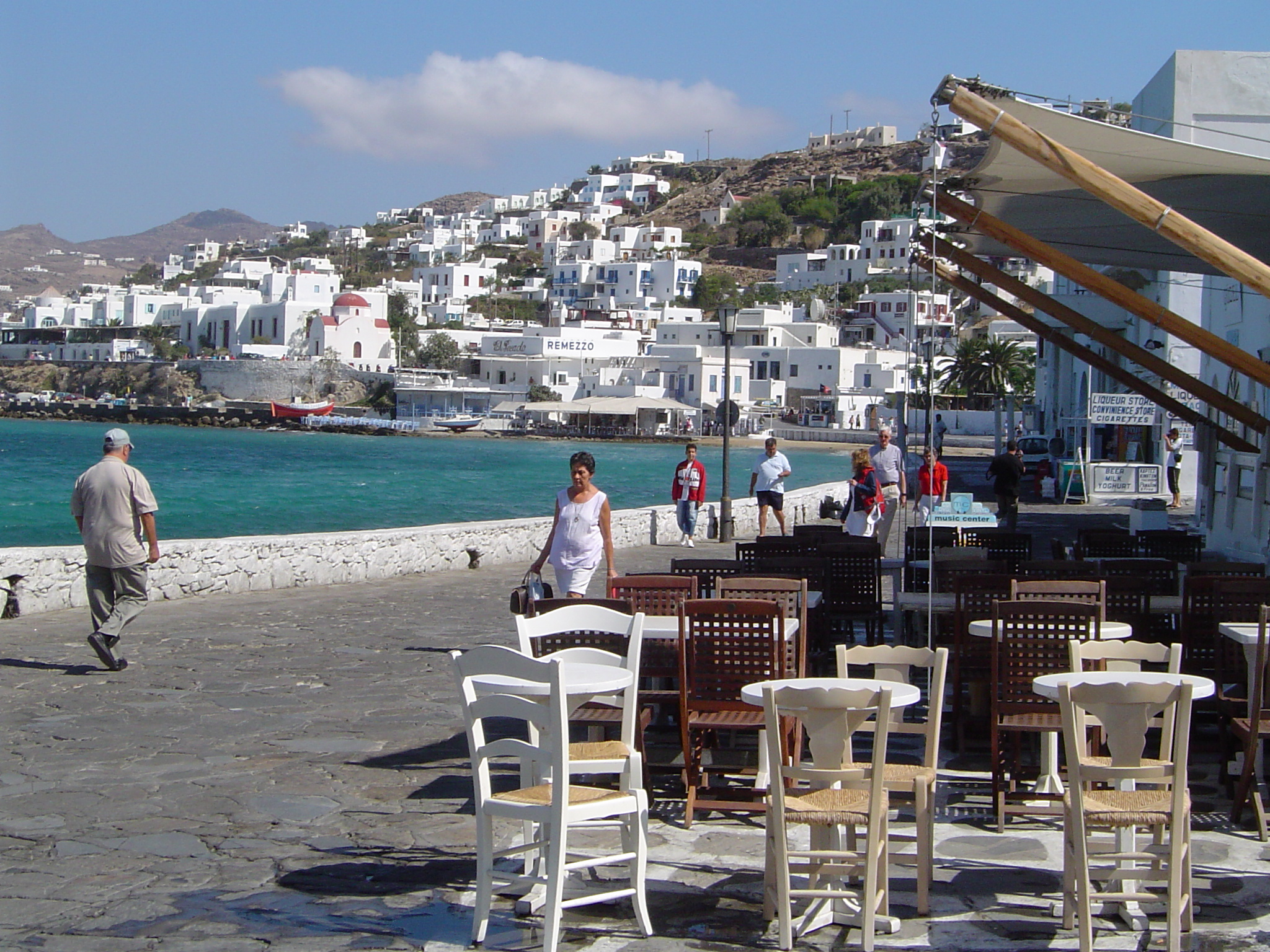 Rouheg Plaz beim Hafen (2005).